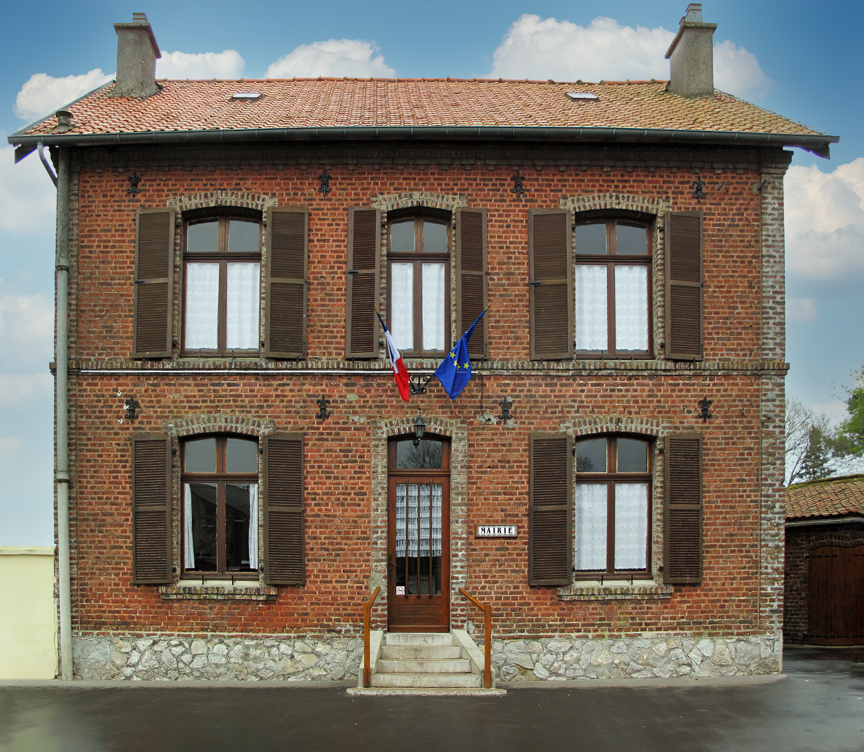 Widehem la mairie